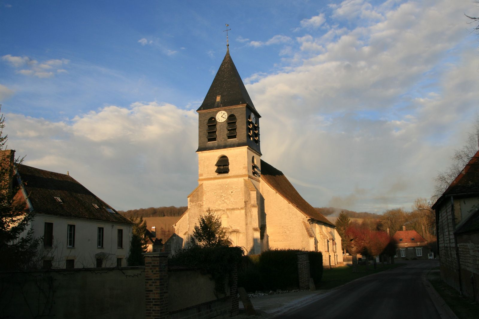 église de Chennegy (Aube, Champagne-Ardenne, France).